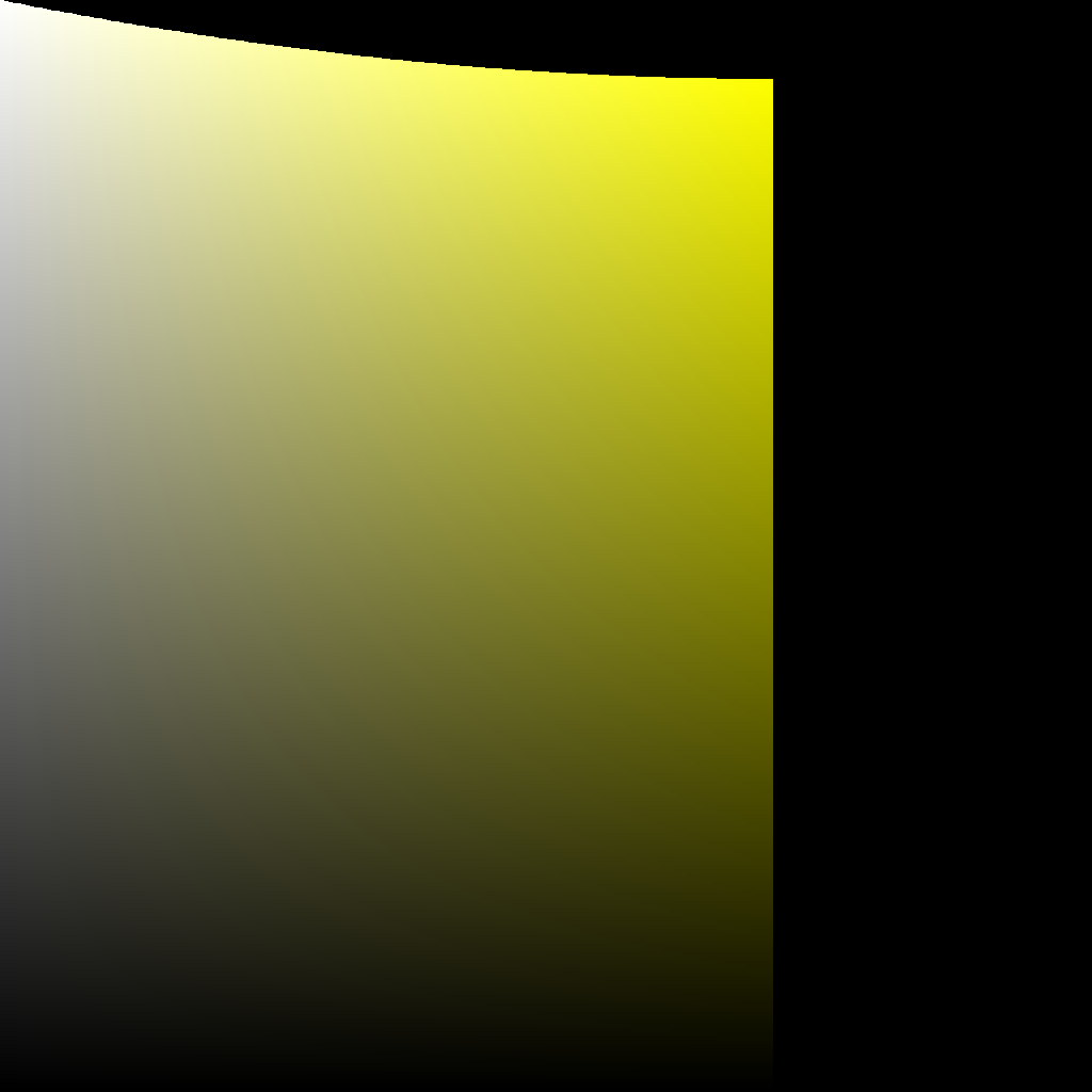 Doorsnede uit een kleurenruimte voor RGB-monitors. Op de assen: intensiteit (vertikaal) en verzadiging (horizontaal). Tint: 60 graden (van 360).